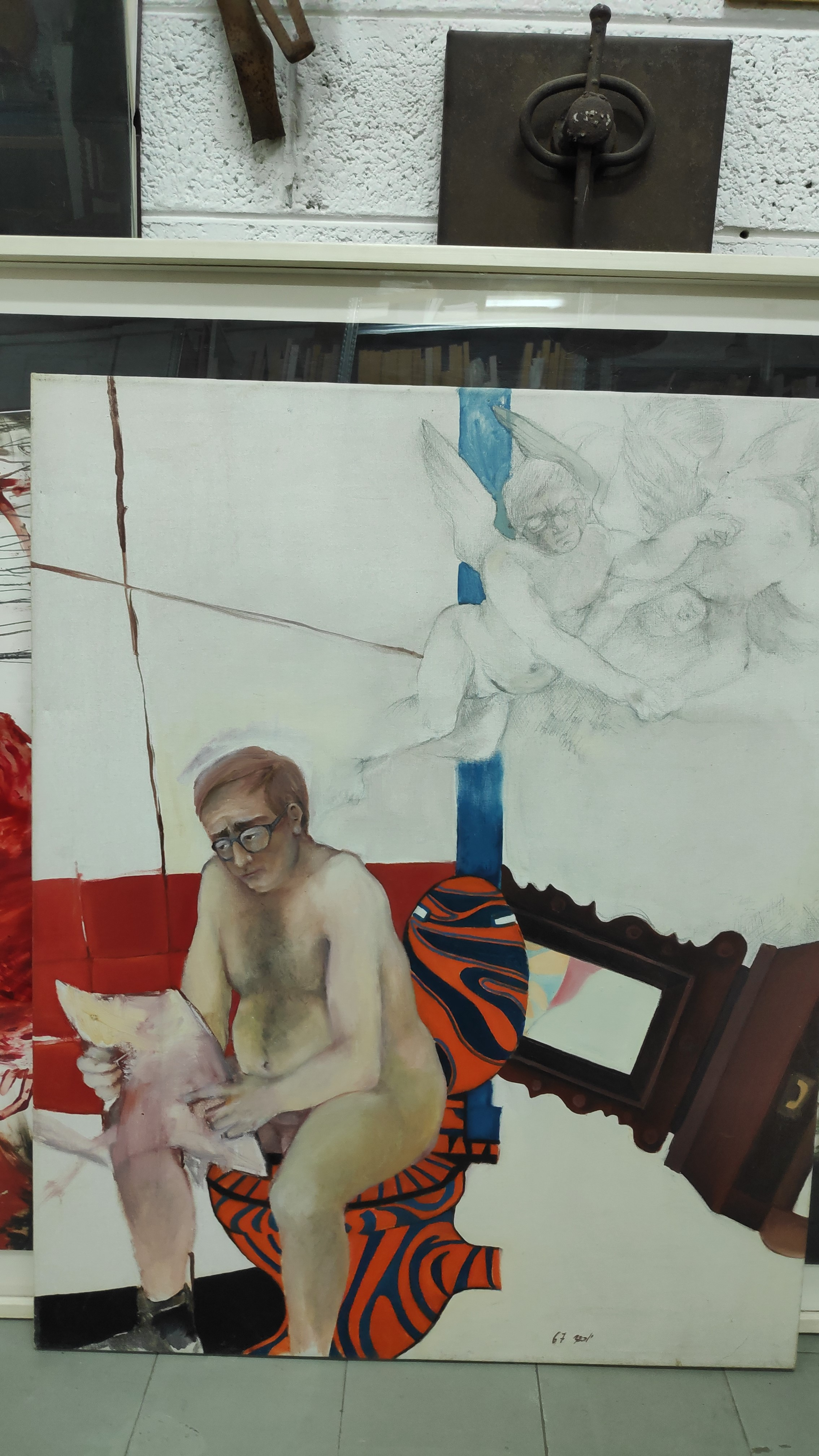 מתוך האוסף של בנו כלב